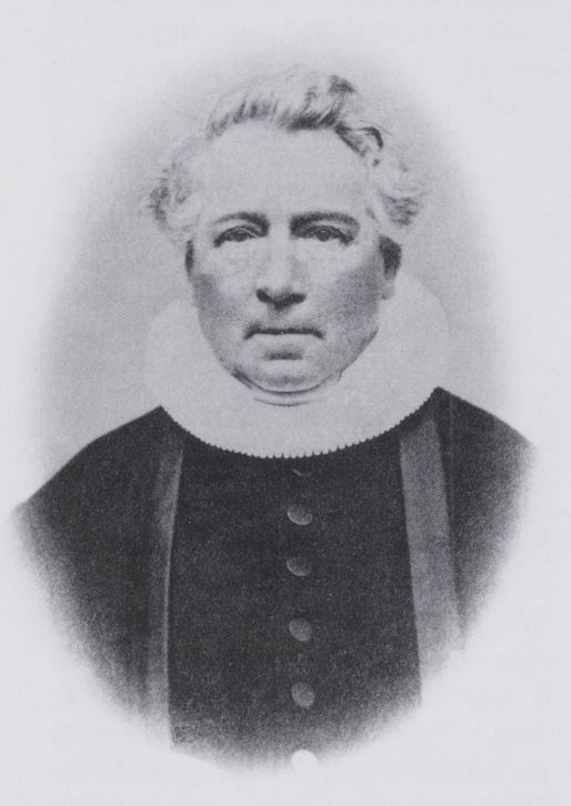 Sokneprest Søren Wilhelm Thorne fotografert ca 1845.